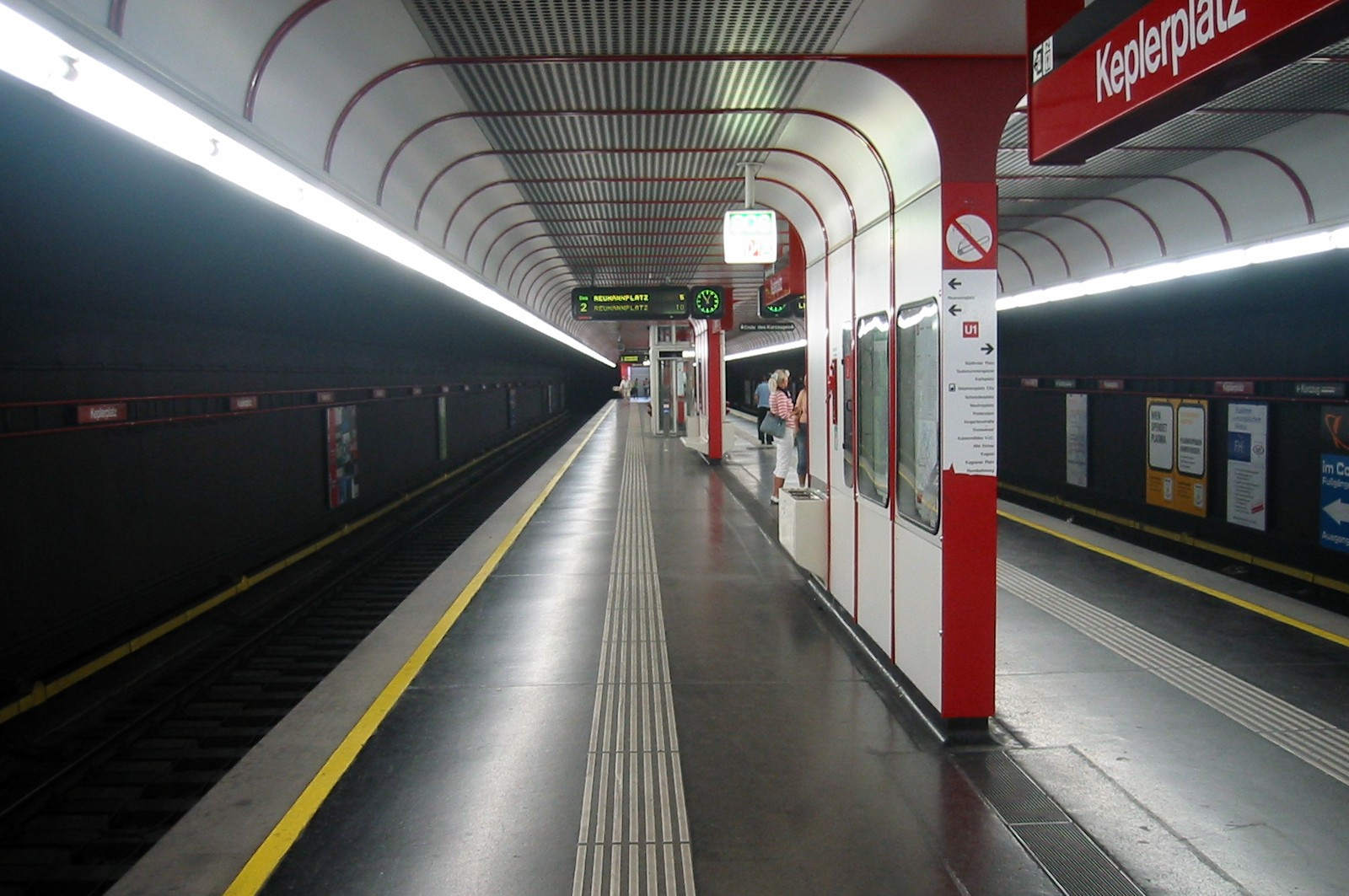 Wien, U-Bahn-Station Keplerplatz, Bahnsteig